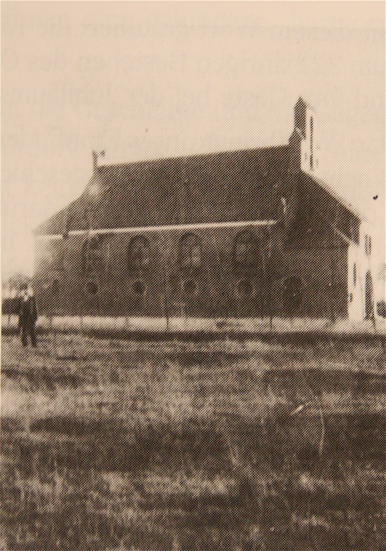 Kirche von Moordorf vor 1908 noch ohne Kirchturm